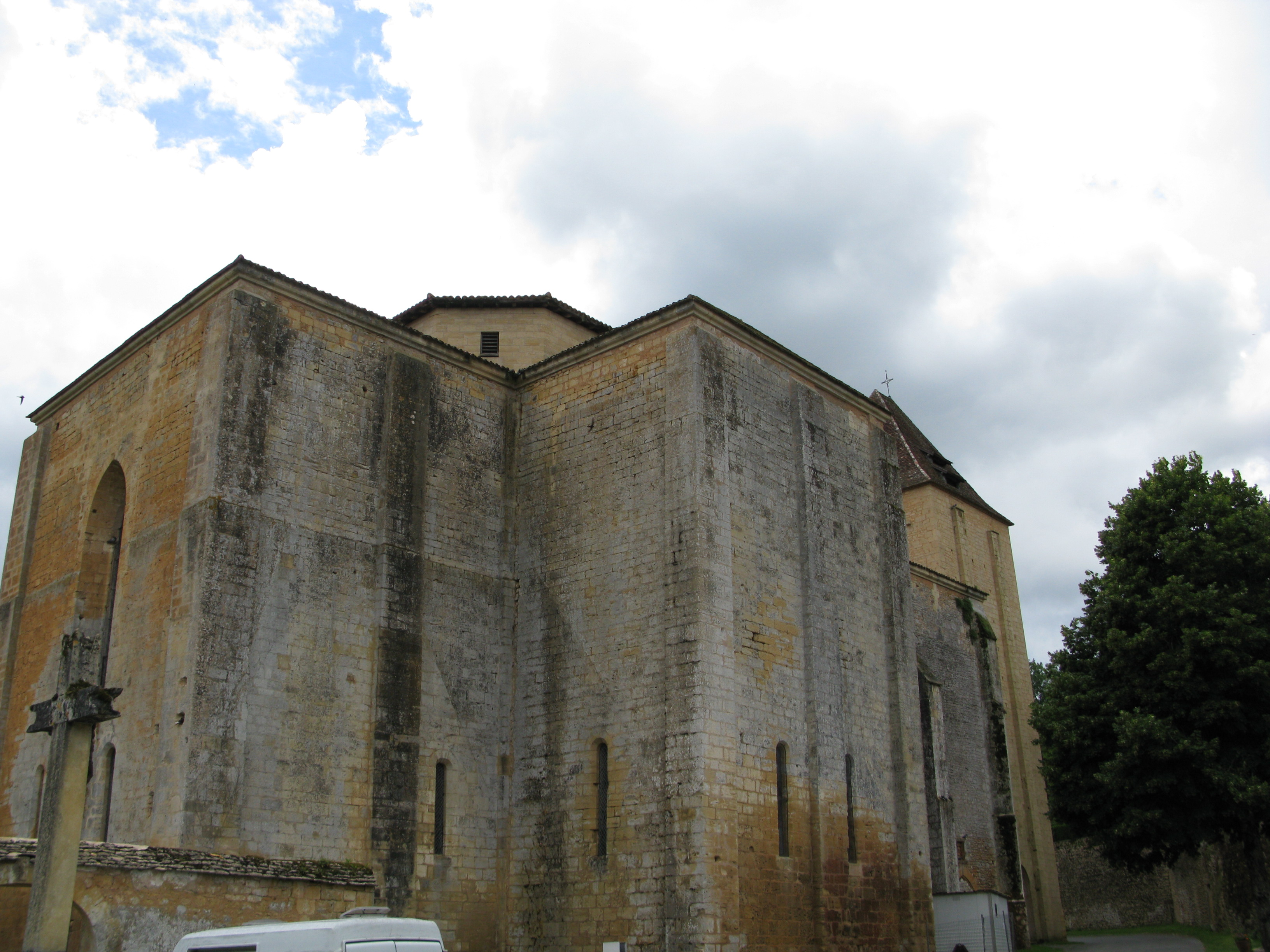 Vue de côté de l'abbatiale (église Saint-Martial) à Paunat